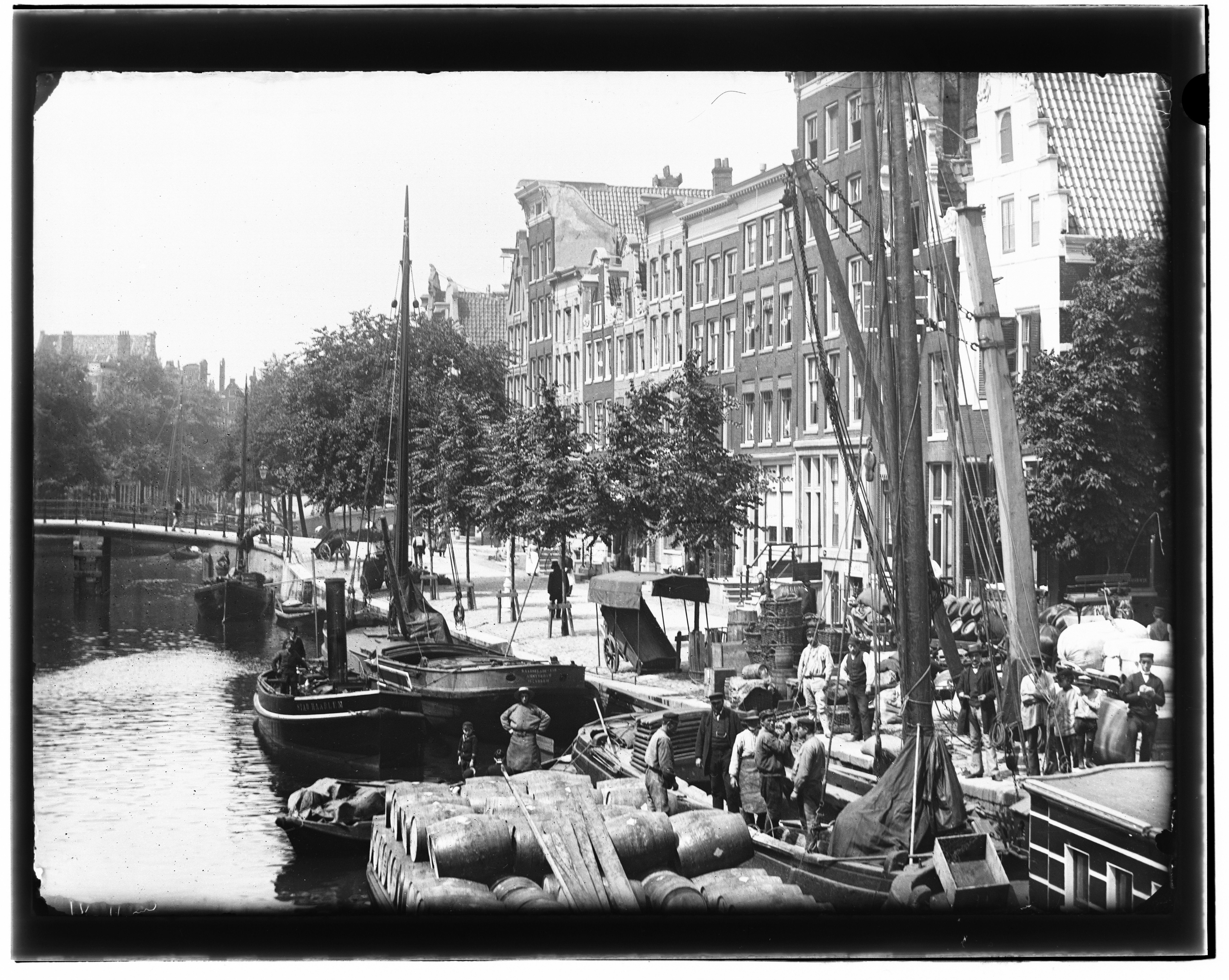 Beschrijving Brouwersgracht 68-70-72 enz. (v.r.n.l.) Hoek Herenmarkt 26. Kaarselade veer (ligplaats van Beurtschepen). Links is brug nr. 56 voor de Binnen Brouwersstraat``, gezien in westelijke richting. Documenttype foto Vervaardiger Olie``, Jacob (1834-1905) Collectie Collectie Jacob Olie Jbz. Datering juli 1891 Geografische naam Brouwersgracht Inventarissen Afbeeldingsbestand 10019A000578 Generated with Dememorixer